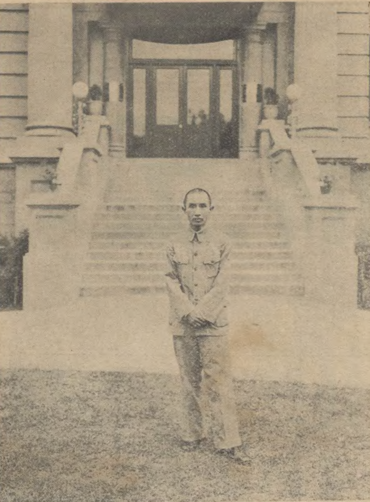 题名： 民生实业公司总理卢作孚先生近影 文献来源： 《工读试刊》 出版时间： 1935 年 卷期(页)： [ 第6期 ，1页 ]